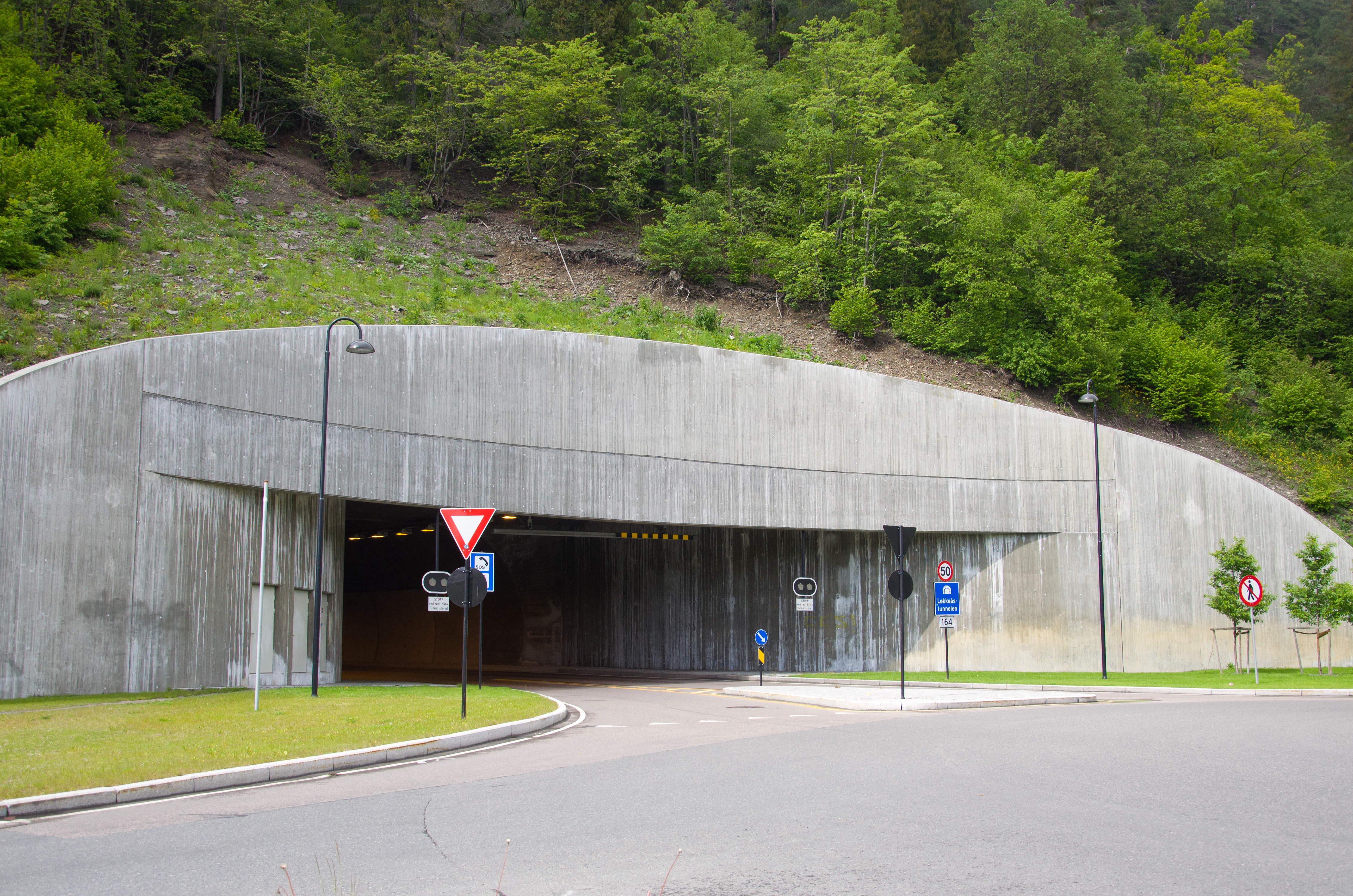 Løkkeåstunnelen ved Sandvika